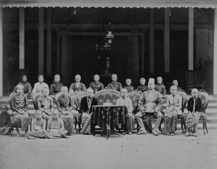 foto. De regent van Toeloengagoeng met gevolg, geportretteerd voor een audiëntievertrek